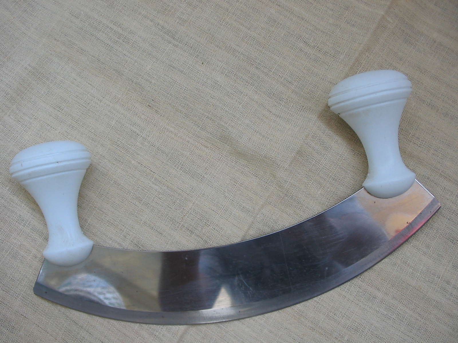 кухонне начиння: кухонний ніж-півмісяць